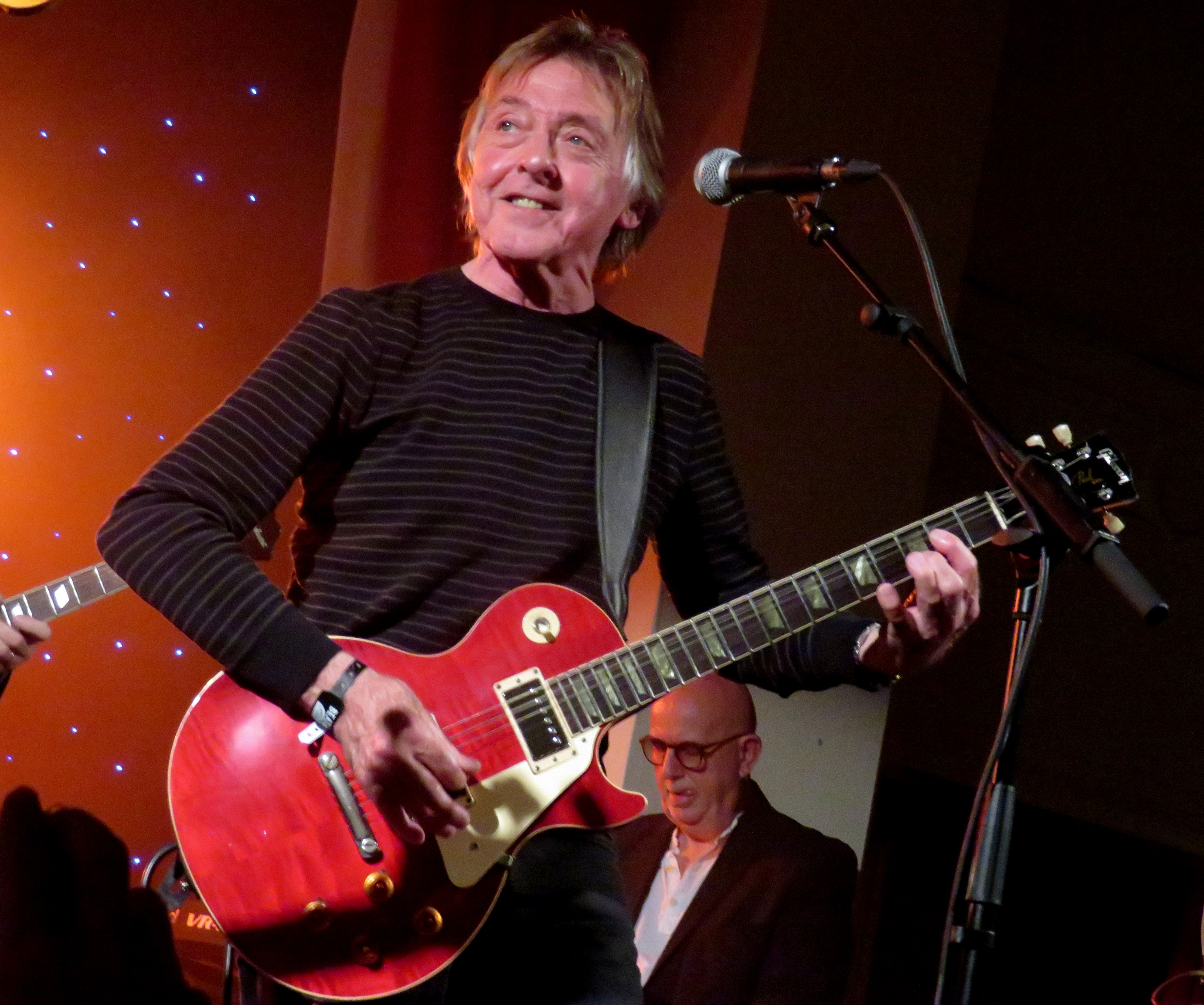 Opname gemaakt tijdens de Beatles conventie in Liverpool. Joey Molland was lid van de groep Badfinger.